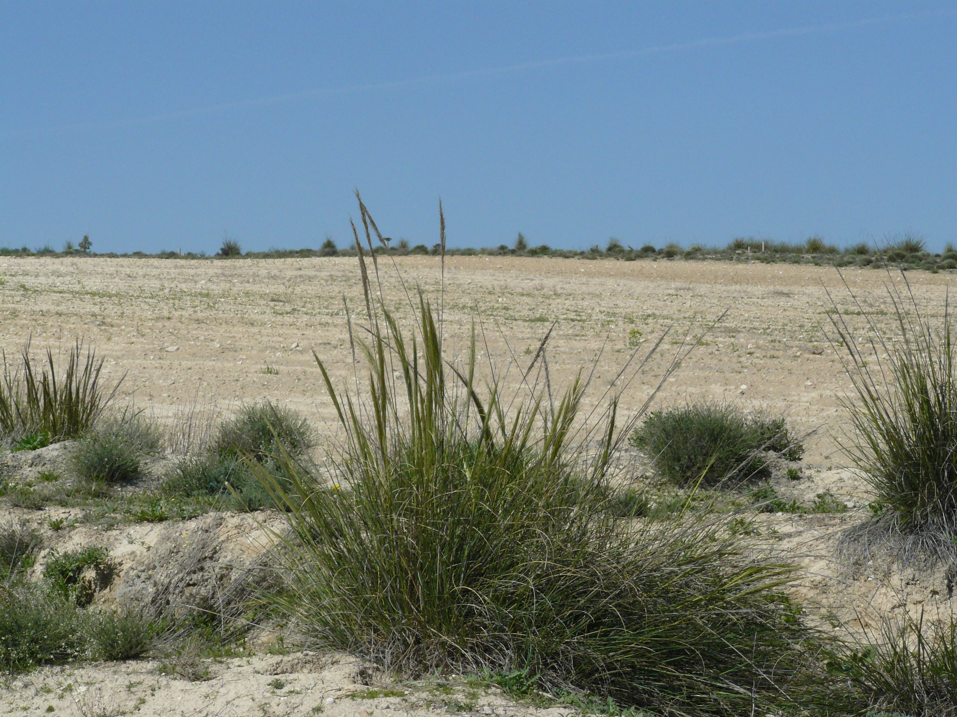 Esparto en la mesa de Ocaña.